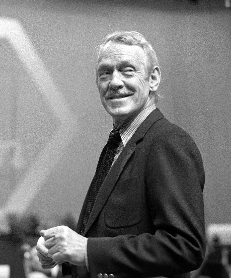 Jos Cleber (Jozef Cleber) 1916-1999Jos Cleber in 1974